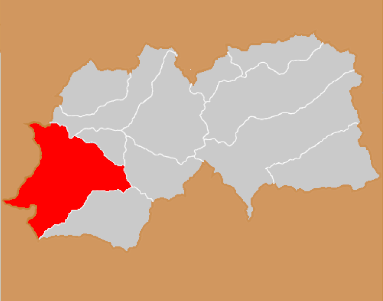 Mapa del Distrito de Pampas Grande, Huaraz